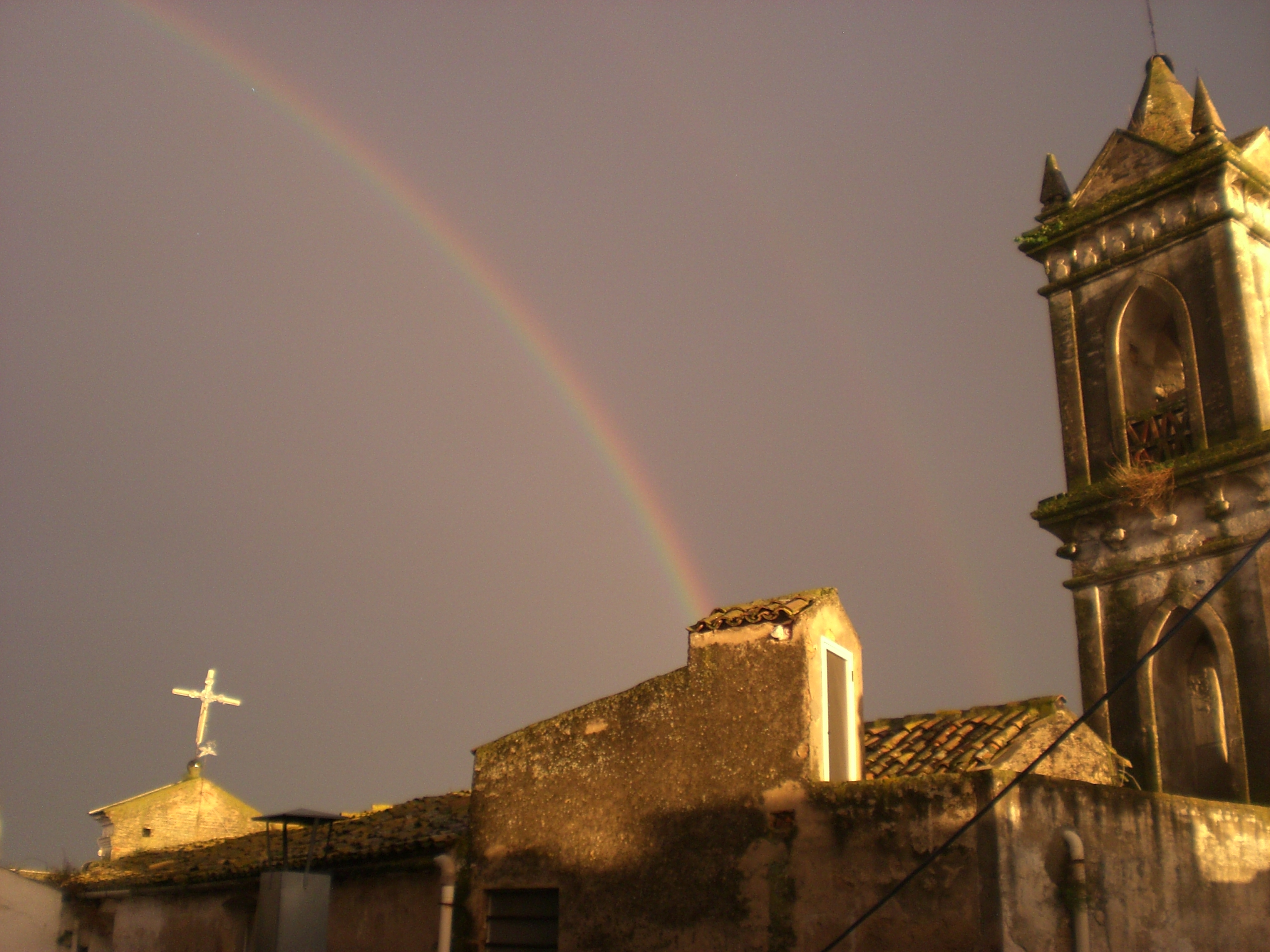 Dettaglio del campanile della Chiesa del Carmelo